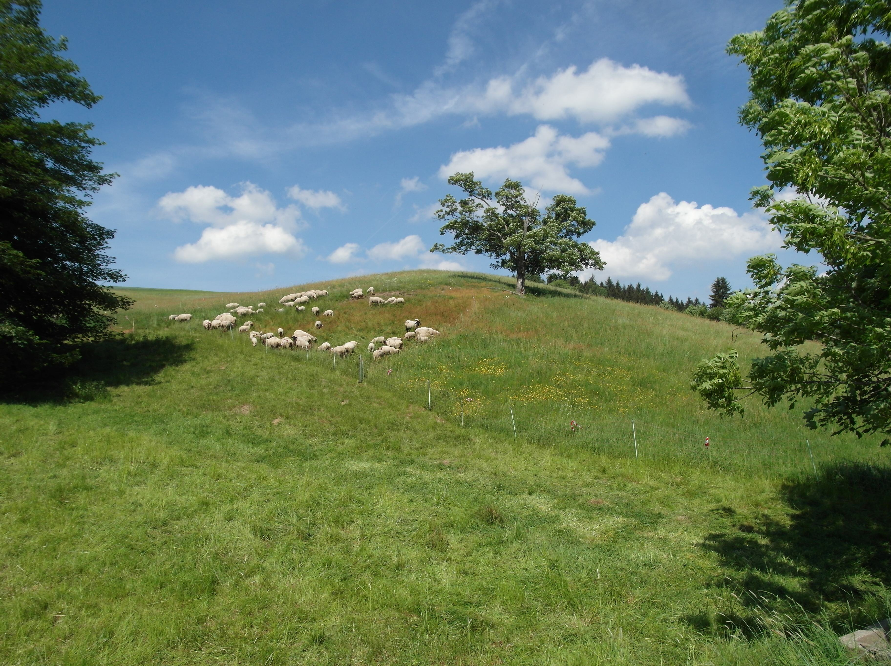 28.05.2018 01744 Oberpöbel (Dippoldiswalde): Schafherde (GMP: 50.781854,13.667004) am Rennberghang. Sicht von der Straße nach Westen. [SAM6525.JPG]20180528320DR.JPG(c)Blobelt